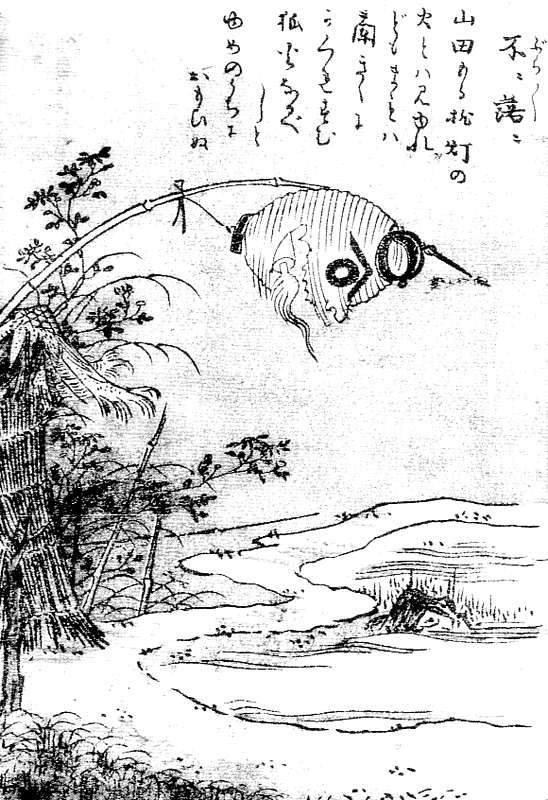 Burabura (不落不落) from the Gazu Hyakki Tsurezure Bukuro (百器徒然袋)